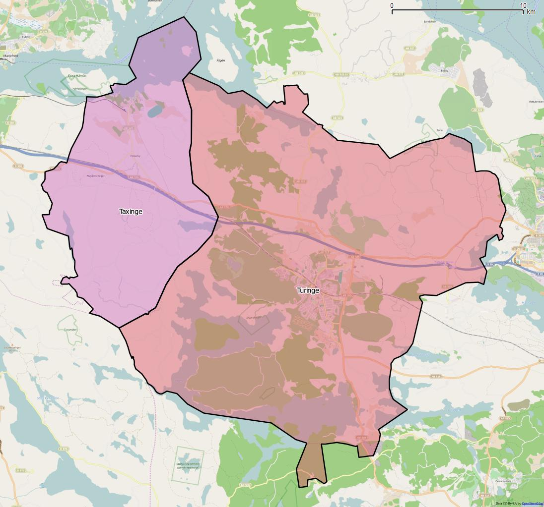 Distriktsindelningen i Nykvarns kommun World file: 37.83987386173633638 0 0 -37.83987386173633638 1916454.74942885455675423 8241022.07648201379925013